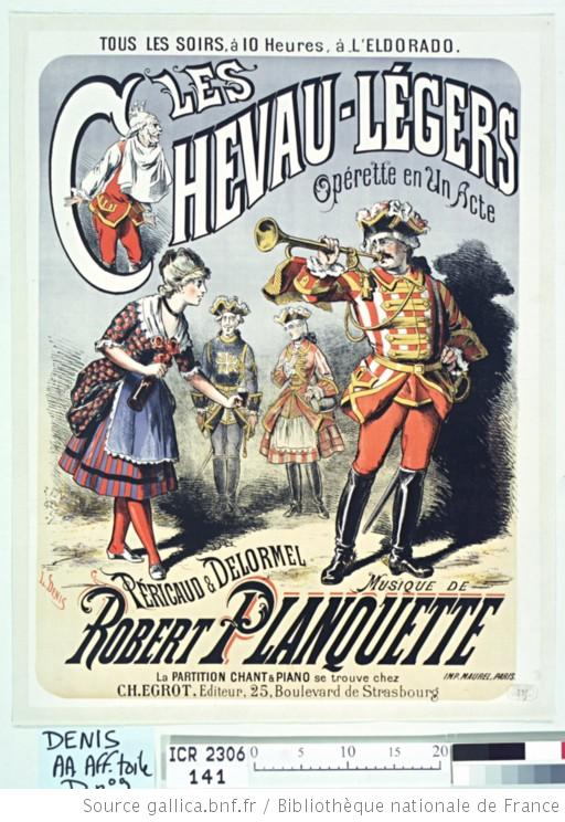 Tous les soirs à 10 heures à l'Eldorado. Les Chevau-Légers, opérette en un acte de Péricaud & Delormel. Musique de Robert Planquette : La partition chant & piano se trouve chez C. Egrot, éditeur, 25, boulevard de Strasbourg. : [affiche] / L. Denis. Lithographie 73 x 56 cm